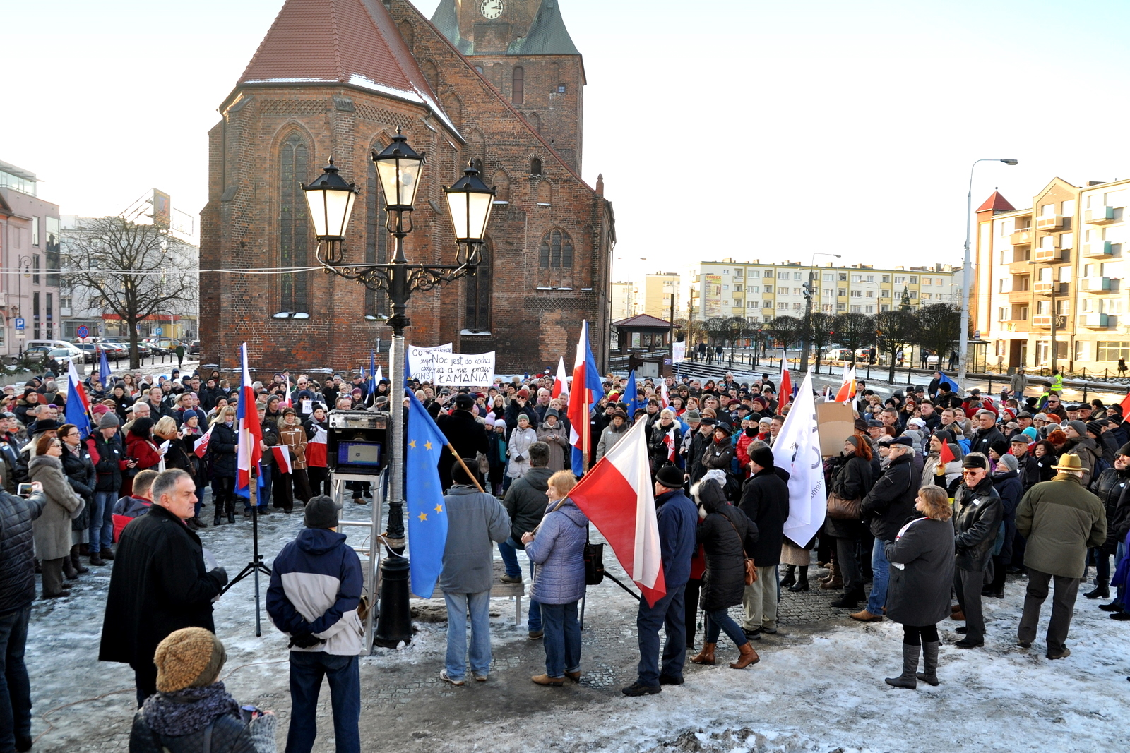 9. 01. 2016 r. Pikieta "Wolne media" zorganizowana przez Komitet Obrony Demokracji na Starym Rynku w Gorzowie Wlkp.